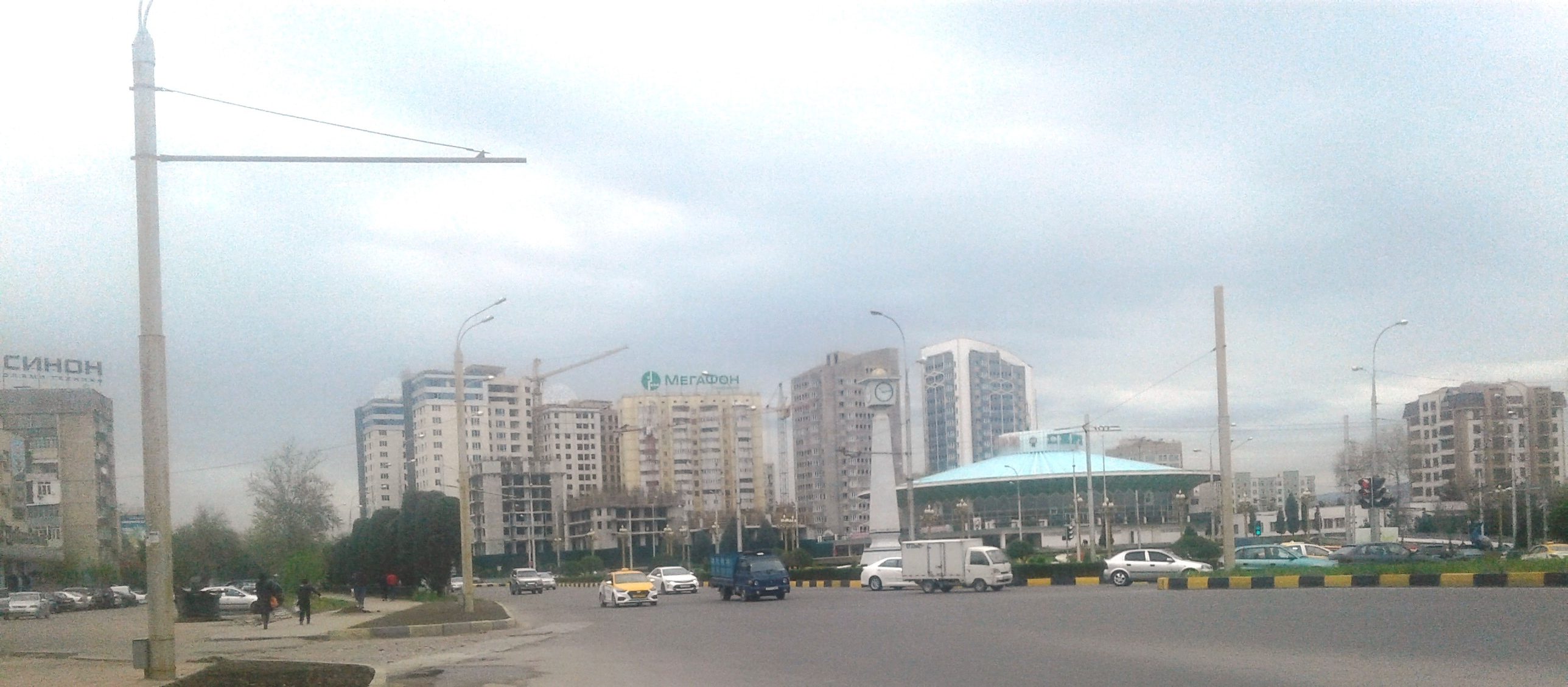 Проспект Саади Ширази, г. Душанбе